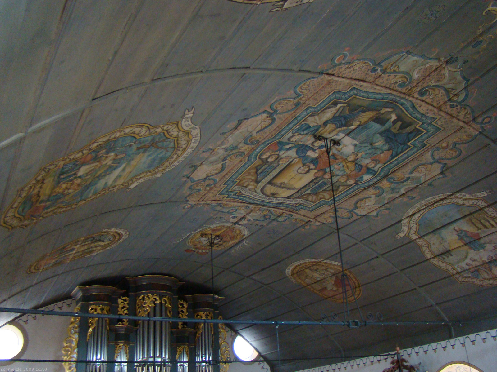 Kirche zum heiligen Kreuz, Weiler an der Zaber, bemalte Tonnendecke